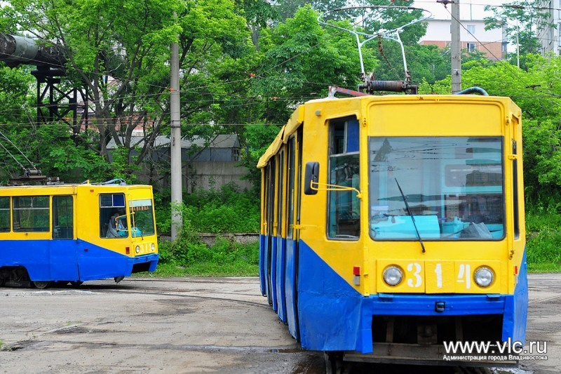 Трамваи КТМ-8 314 и КТМ-8 3?? во Владивостоке